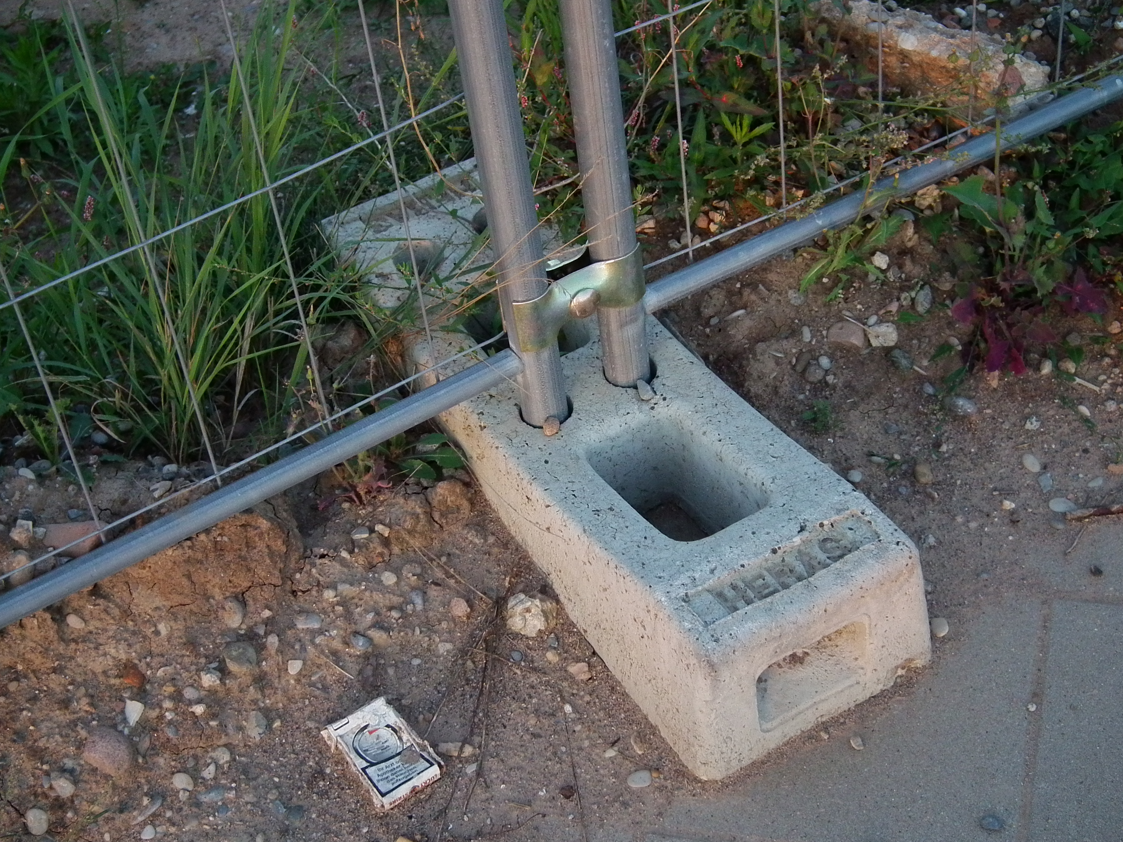 Betonblock der Firma Heras_sks zum Fixieren eines Baustellenzauns, fotografiert in Heidelberg (Baden-Württemberg, Deutschland)